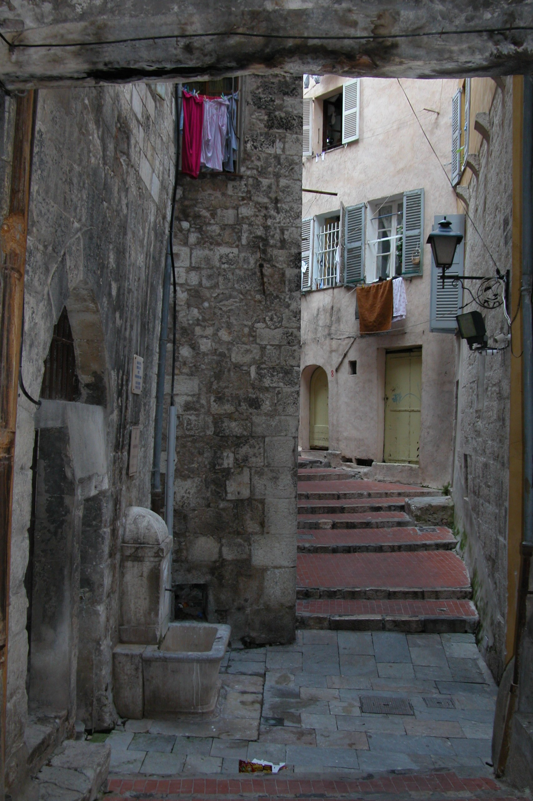 La Rue des Sœurs à Grasse. Un exemple des multiples ruelles caractéristiques du centre ville.